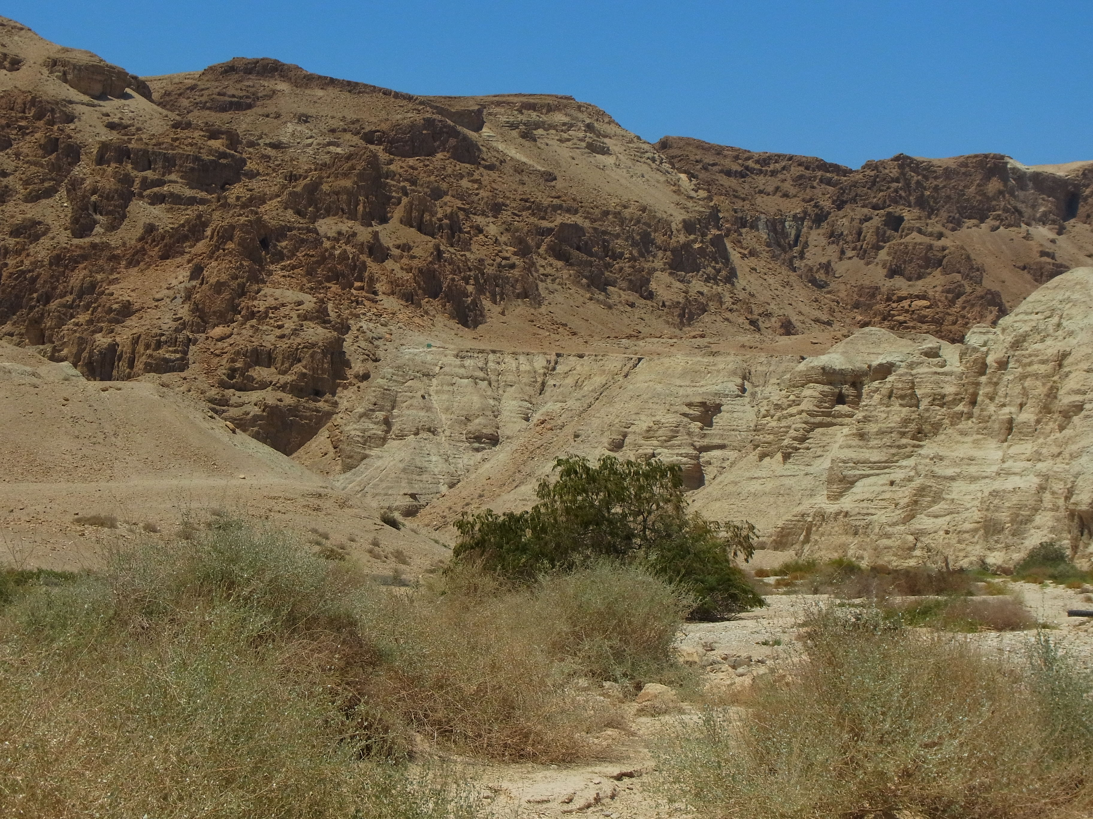 中文（香港）: 發現死海古卷之库姆兰山洞